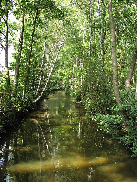 Schwalm zw. Hariksee und Brüggen.